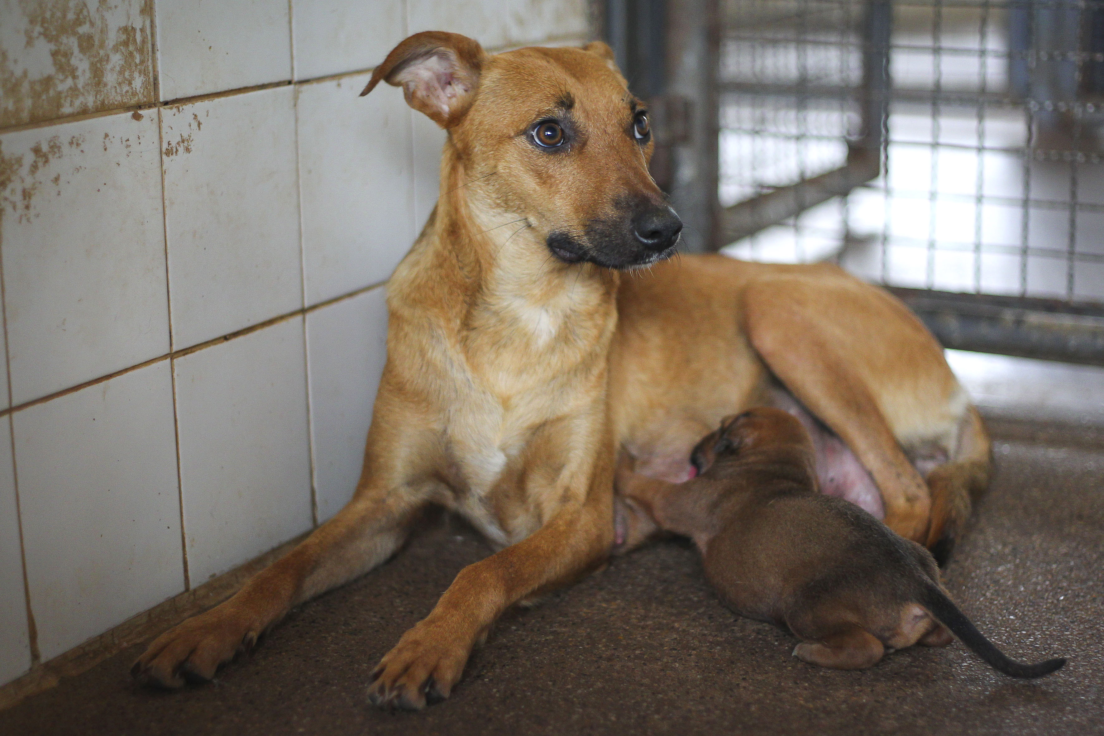 Brasília, DF, Brasil, 11/3/2015 Foto: Andre Borges/Agência Brasília Cães disponíveis para adoção no Centro de Controle de Zoonoses do DF.